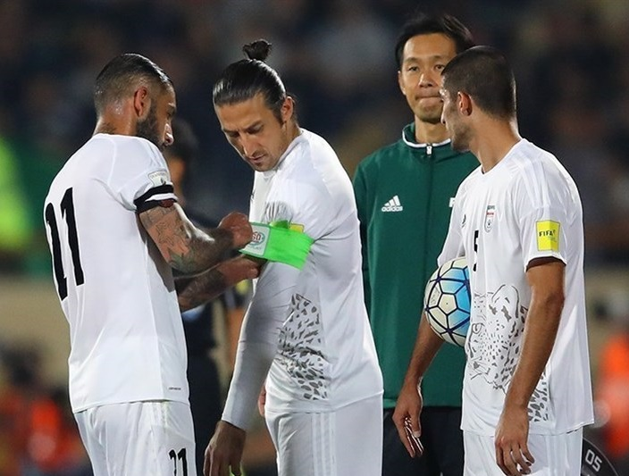 آندرانيک تیموریان در تیم ملی فوتبال ایران